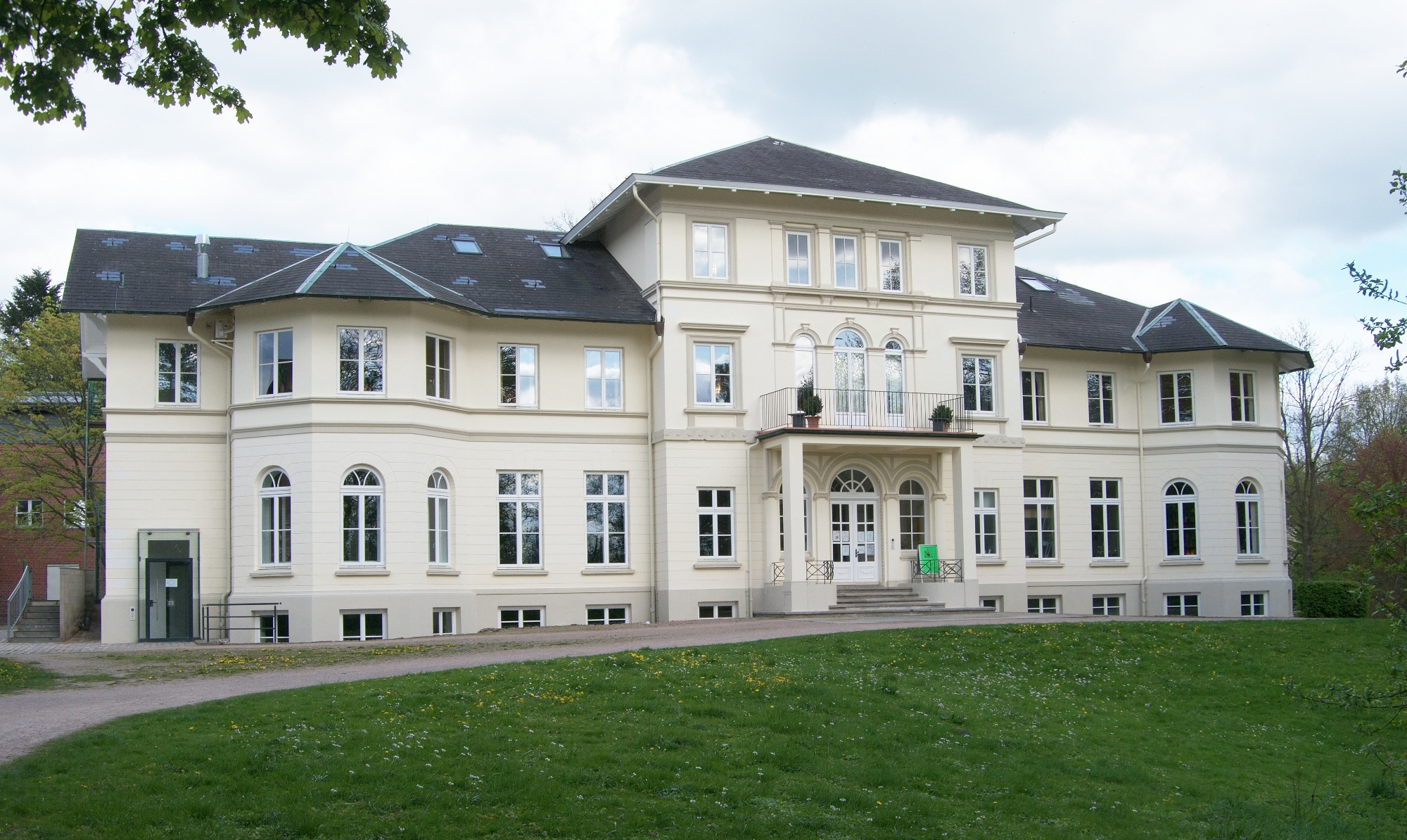 Herrenhaus im Gutspark Berne, genannt: Schloss Berne This is a photograph of an architectural monument.